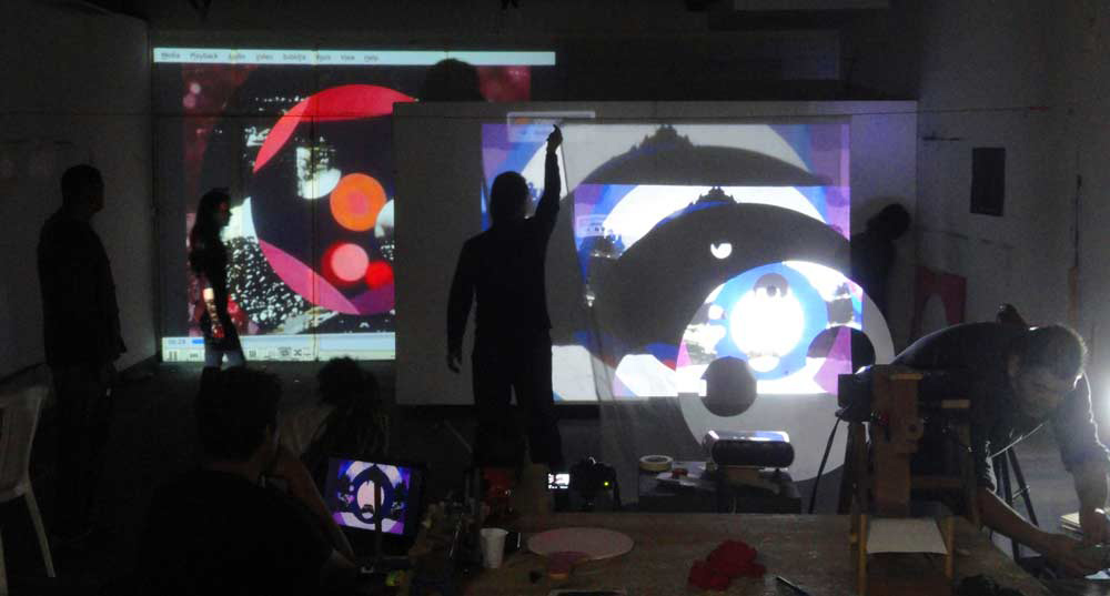 Parte da performance multimídia Incursões especulativas dentro e fora do cone, de Chico Machado, Porto Alegre. Projeção de vídeo sobre várias superfícies.